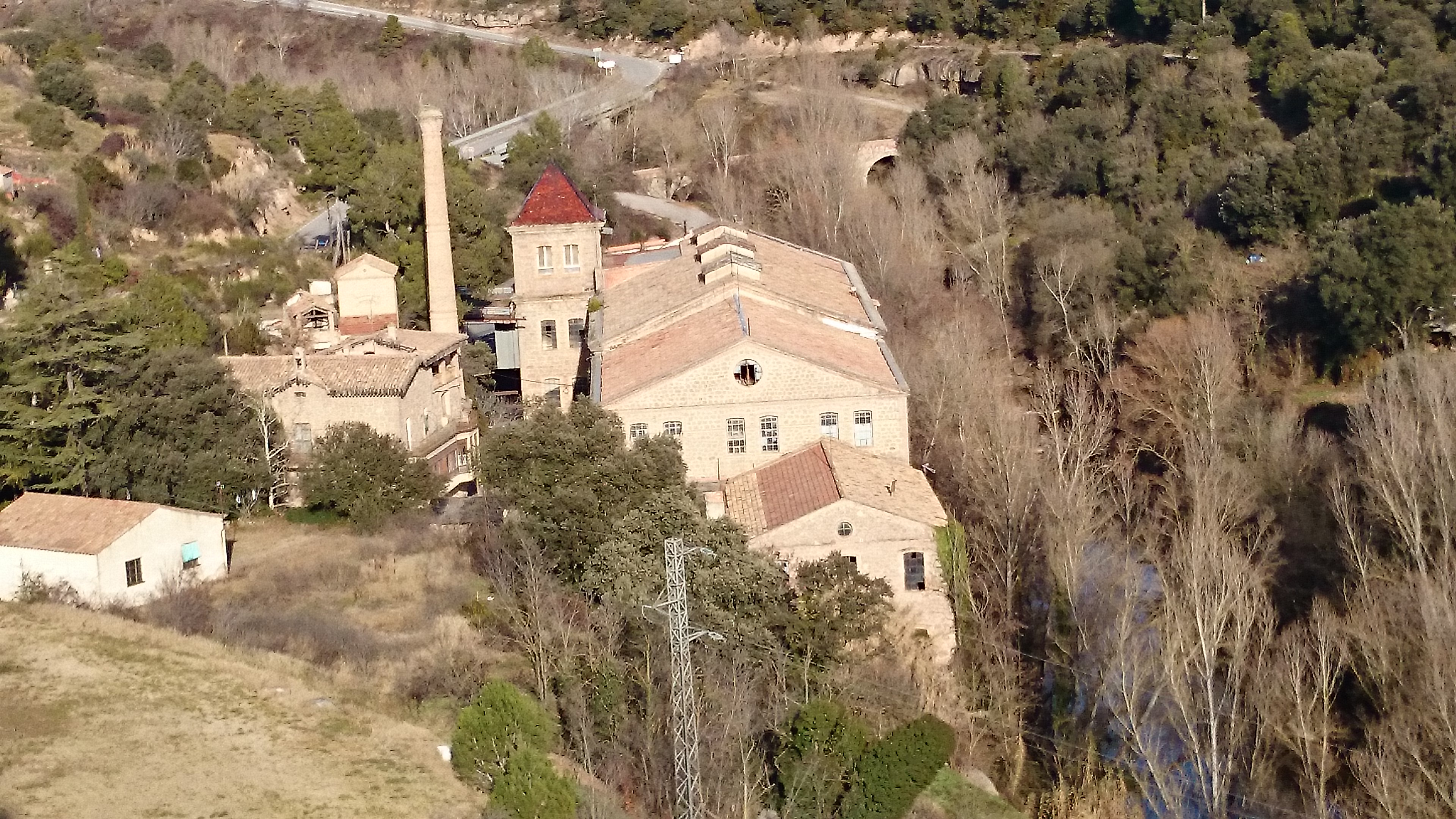 Fàbrica de Cal Casas i la Torre, amb el pont de Periques al fons.